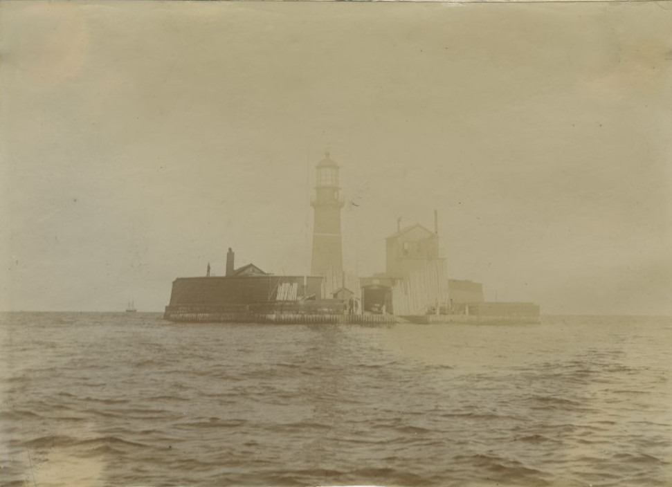 Kolka tuletorn 20. sajandi alul.